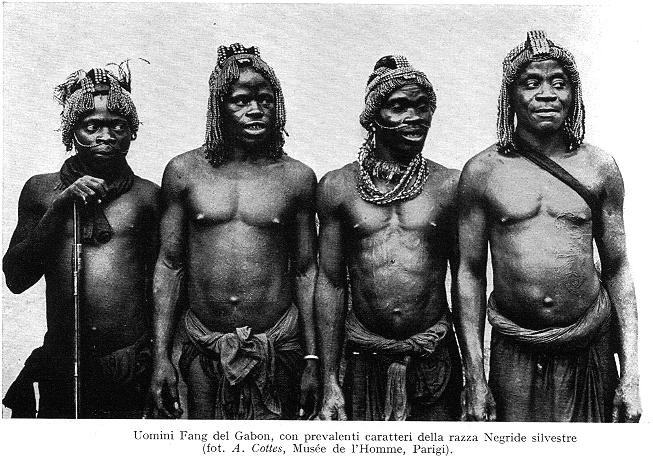 Four Gabonese men.